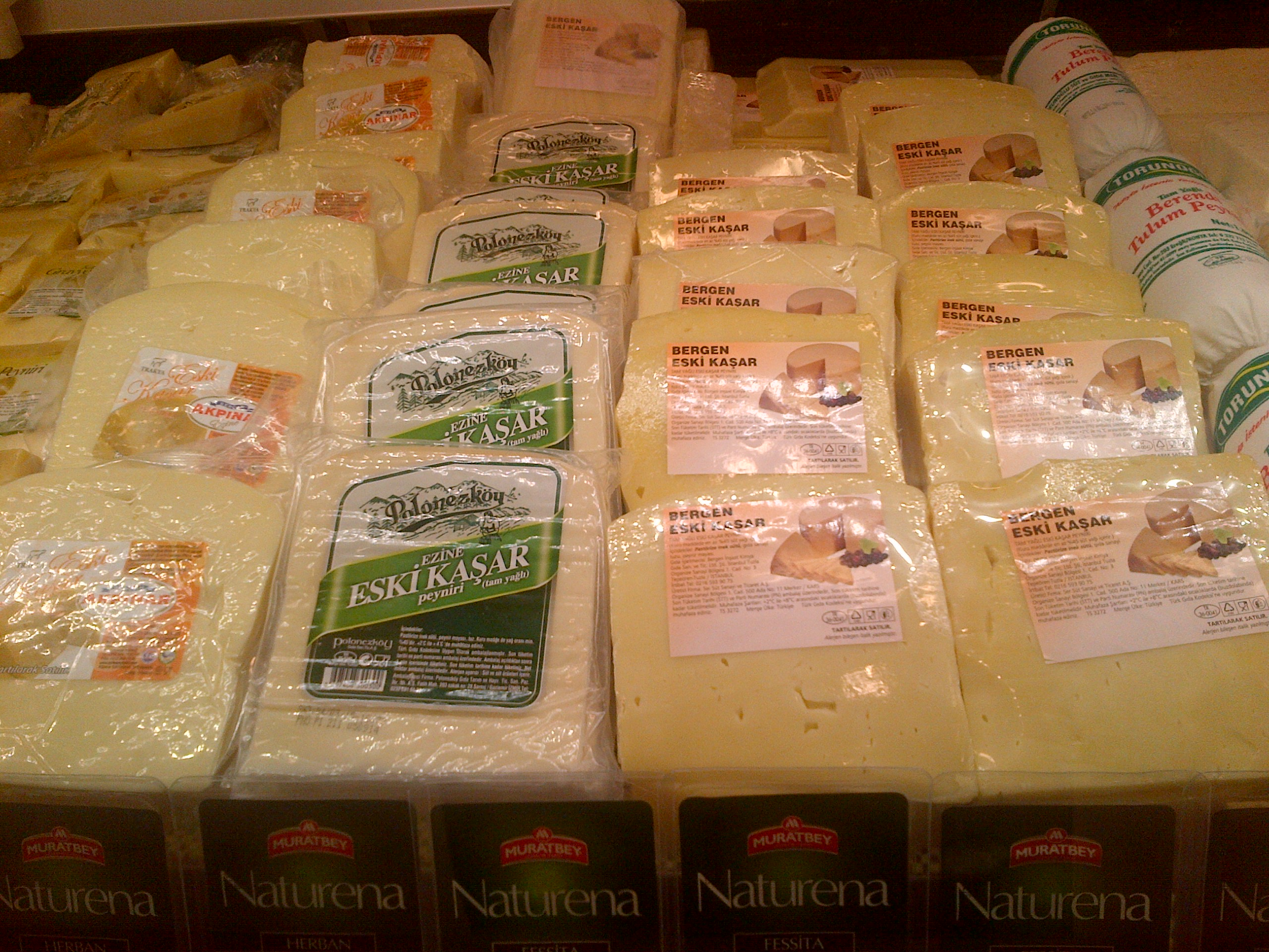 Kaşar peyniri, de la variedad "eski" (envejecido), como los ejemplos en la imagen, es muy similar al queso manchego.